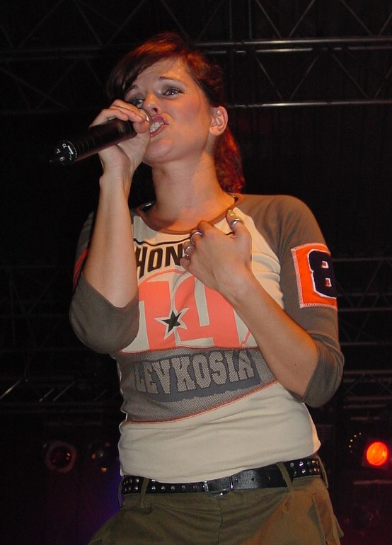 Sängerin Marta Jandová mit ihrer Band Die Happy auf dem Festival "Rock im Hinterland" in Obrigheim (Pfalz)